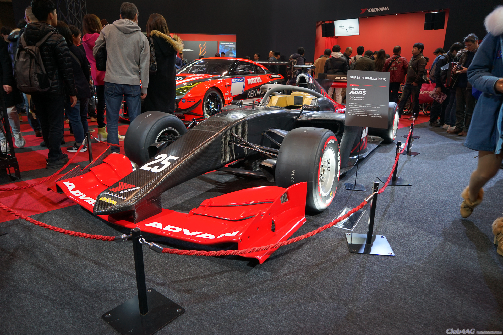 Tokyo Auto Salon 2019